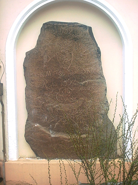 Jasionna-kamień erekcyjny na dworze.